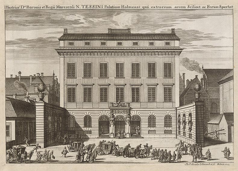 Titel i svensk övers. : Den vittberömde herr baronen och hovmarskalken N. Tessins palats i Stockholm sett från slottet och torget